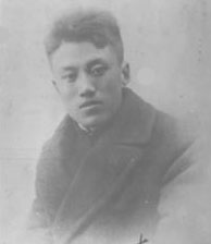 中文（中国大陆）: 王青士烈士肖像